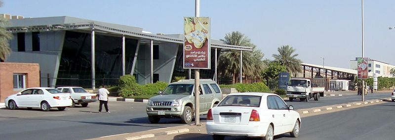 Coca-Cola Company - Khartoum Bahari - Sudan